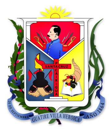 Escudo del Municipio Zamora del Estado Miranda, Venezuela, creado con editor de imágenes